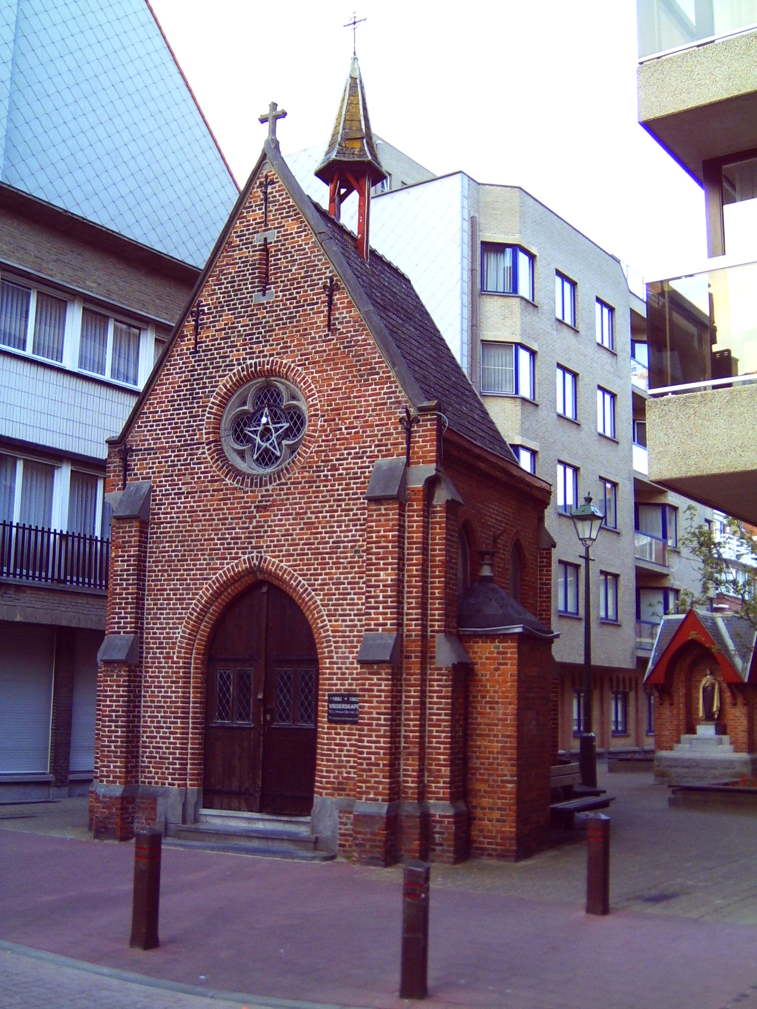 't Visscherskapelletje in Heist (Knokke-Heist), Belgium